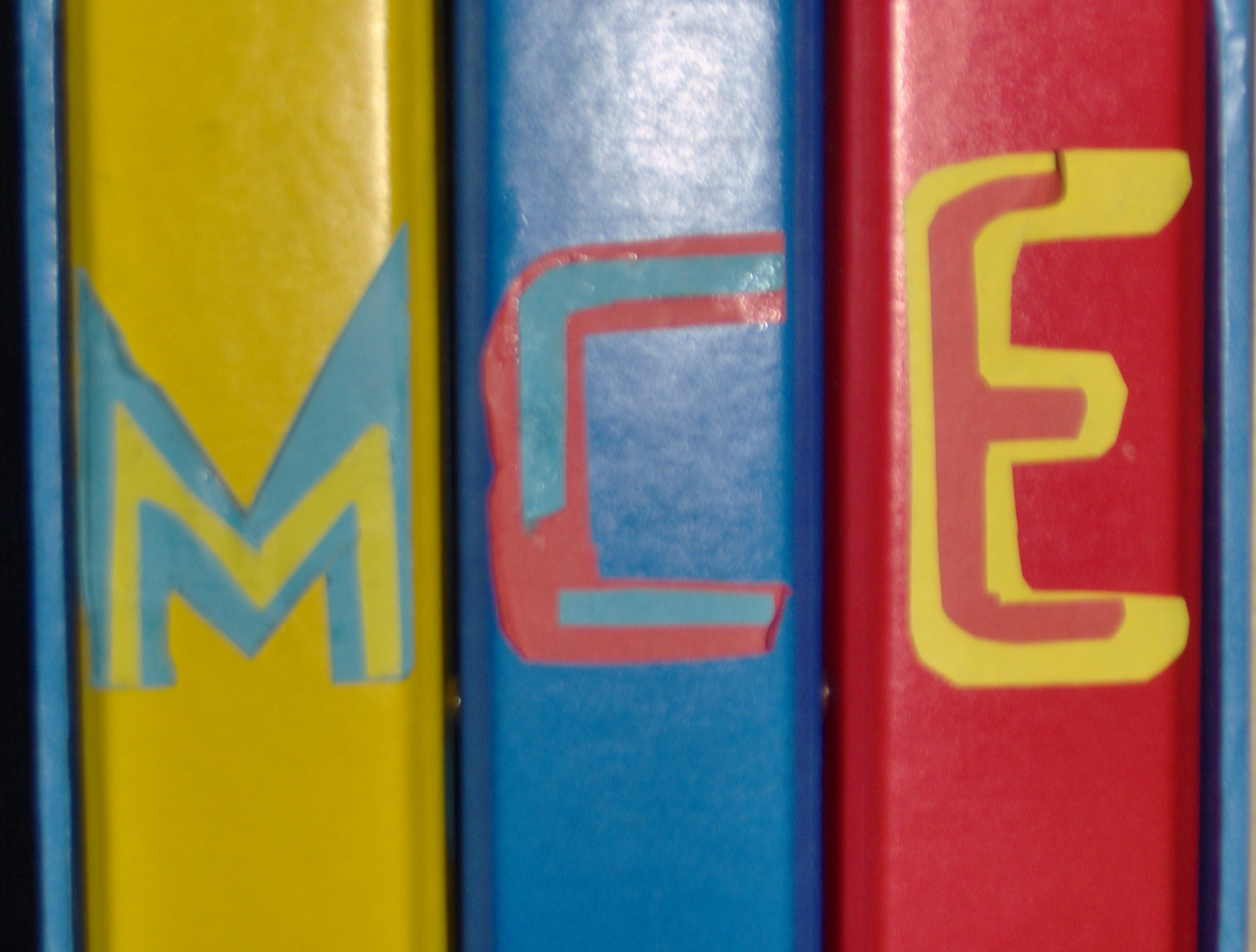 DescriÃ§Ã£o: 3 capas coloridas o "M","C","E"! Fonte e crÃ©ditos: Foto tirada por mim, capa do MCE da Rita Wemans LicenÃ§a